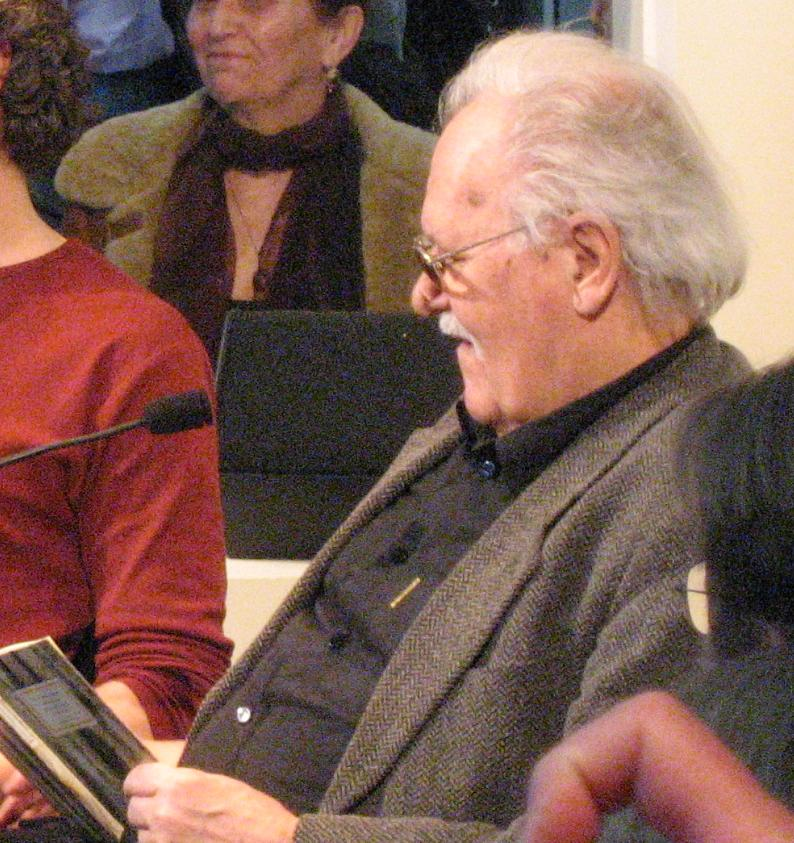 Walter Niklaus (deutscher Schauspieler und Regisseur) auf der Leipziger Buchmesse 2008